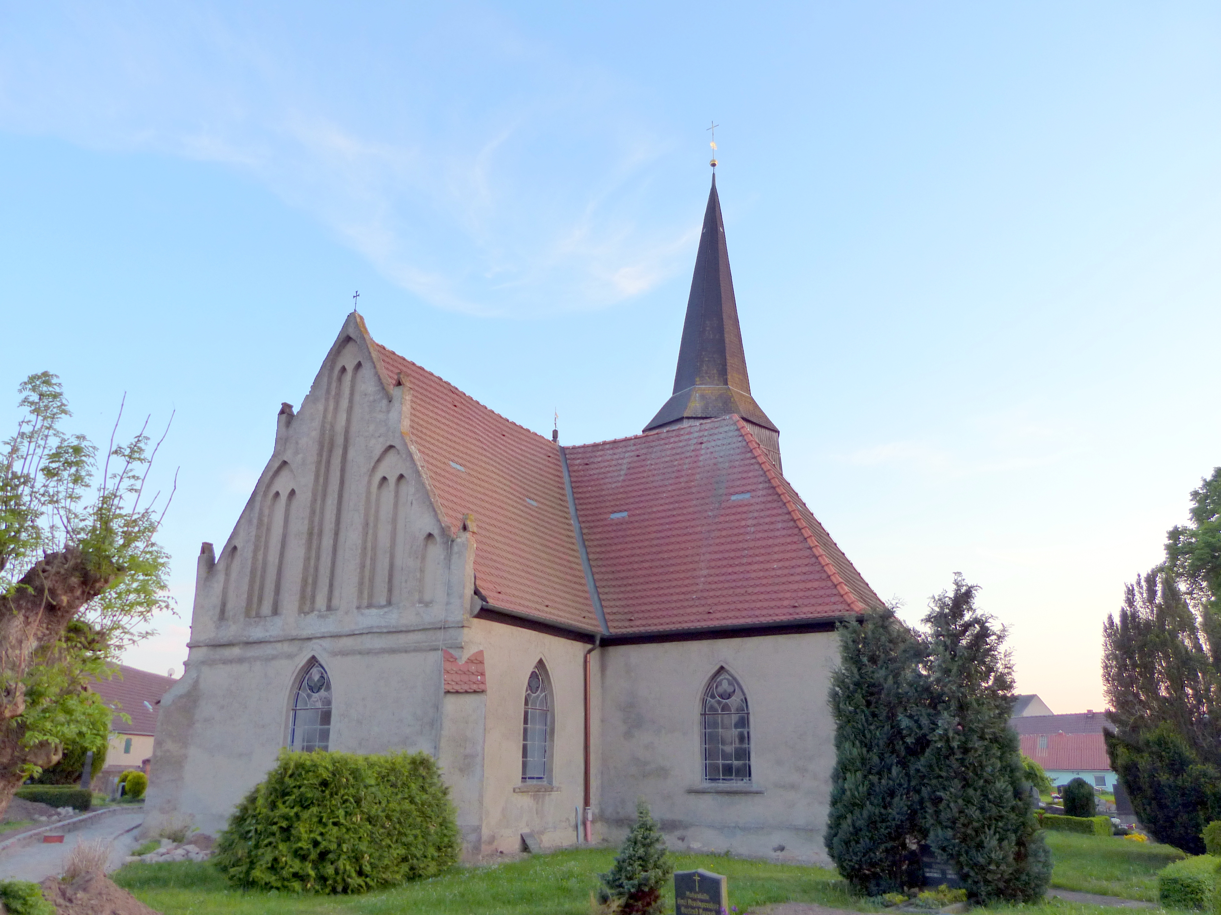 Bartow Vorpommern, Ostgiebel und nördlicher Anbau der Kirche